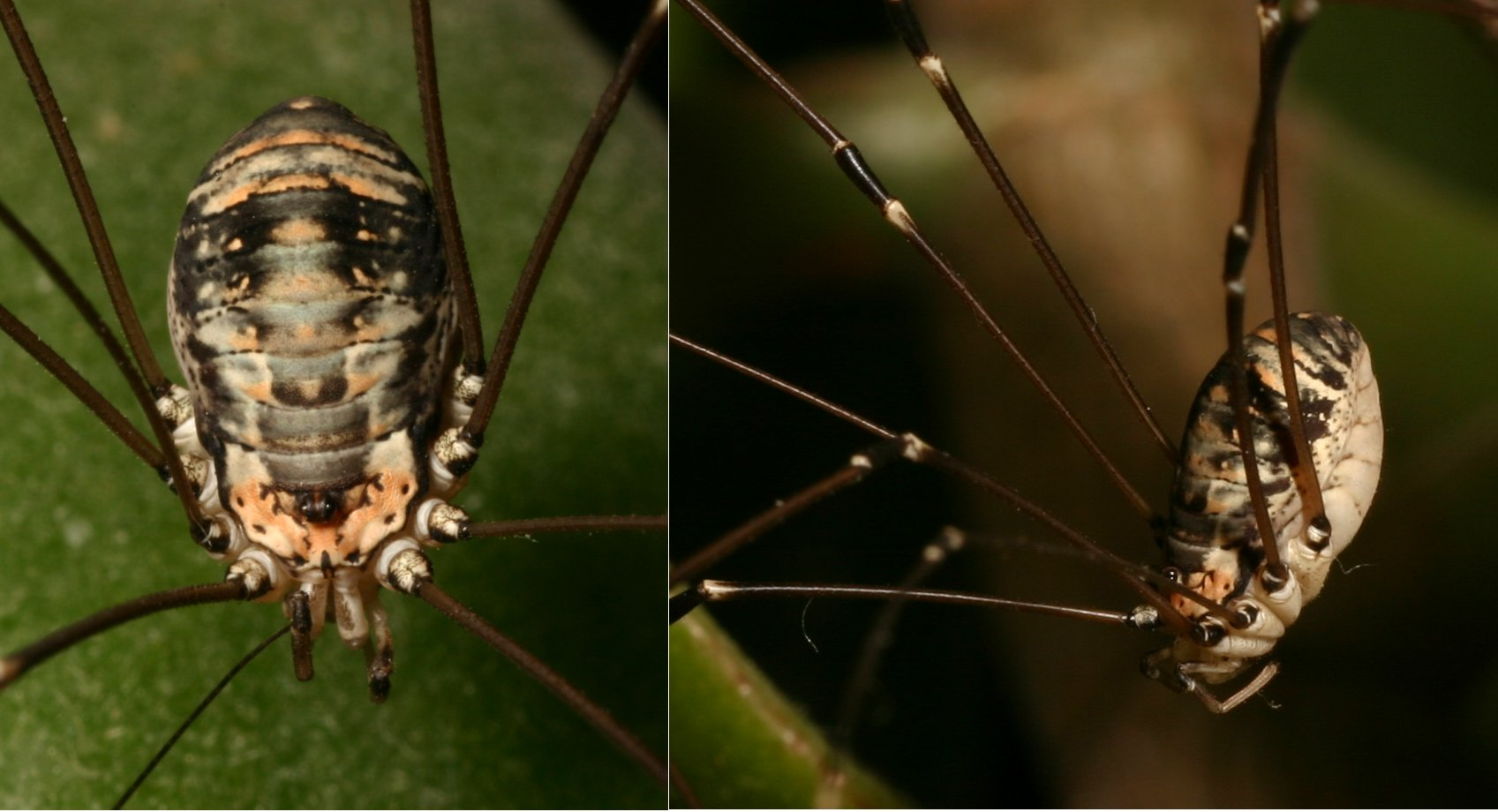 Weberknecht Nahaufnahme, Dorsal- und Seitenansicht